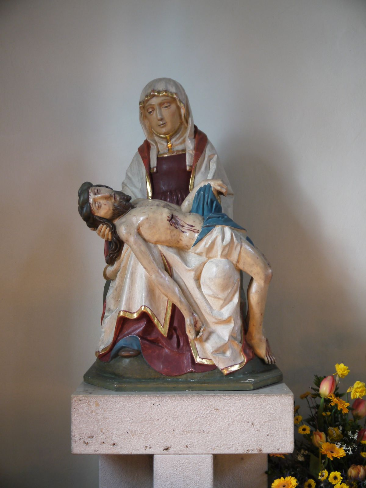 Kirche St. Marien in Salzgitter-Bad - Vöppstedter Pieta, Anfang 15. Jahrhundert